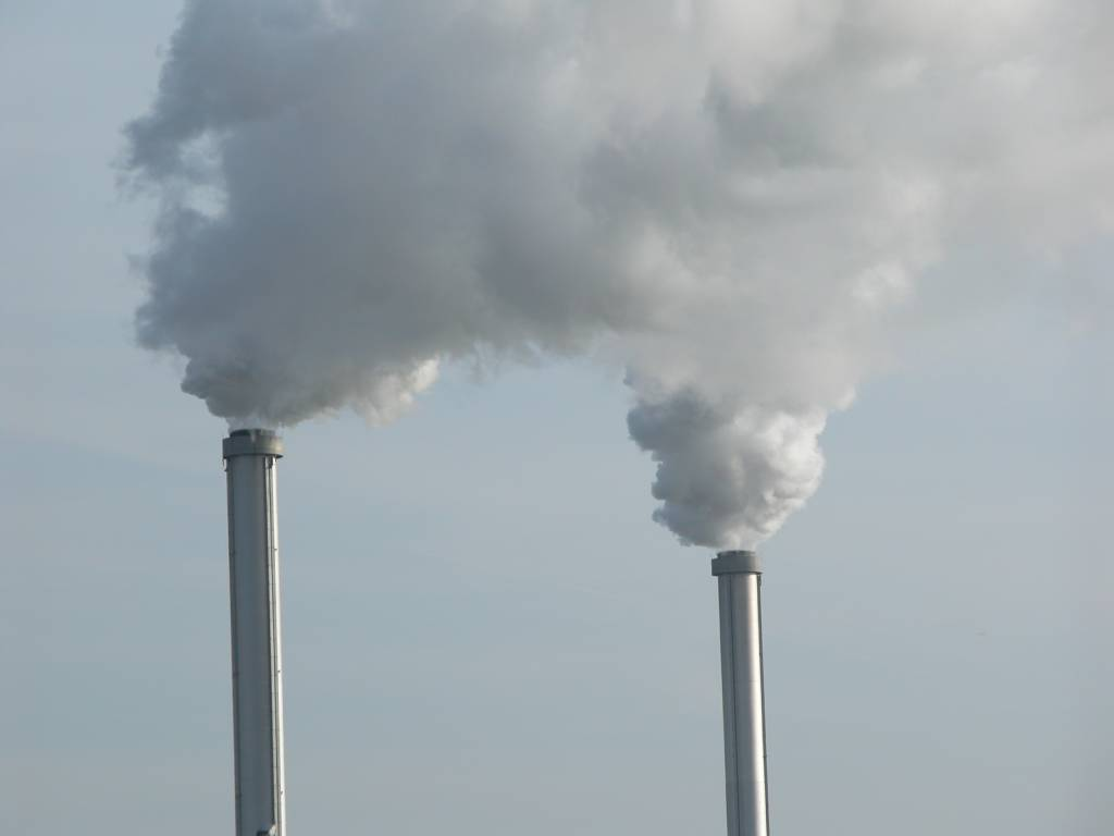 Gyárkémény